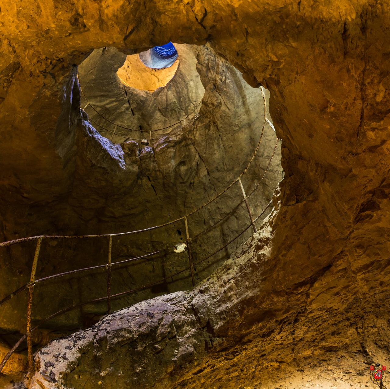 Винтовая лестница осадного колодца Тик-Кую, Чуфут-Кале, Крым